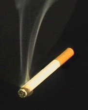 Zigarette